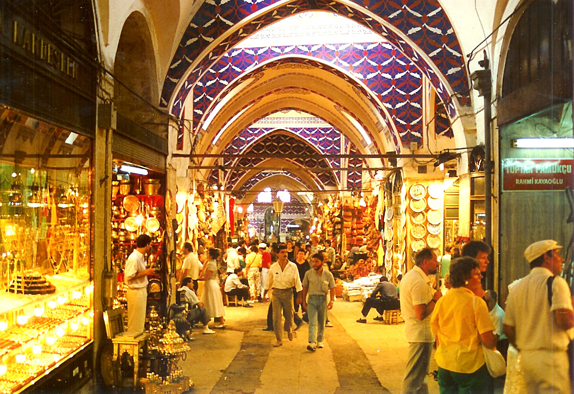 Basar zu Istanbul